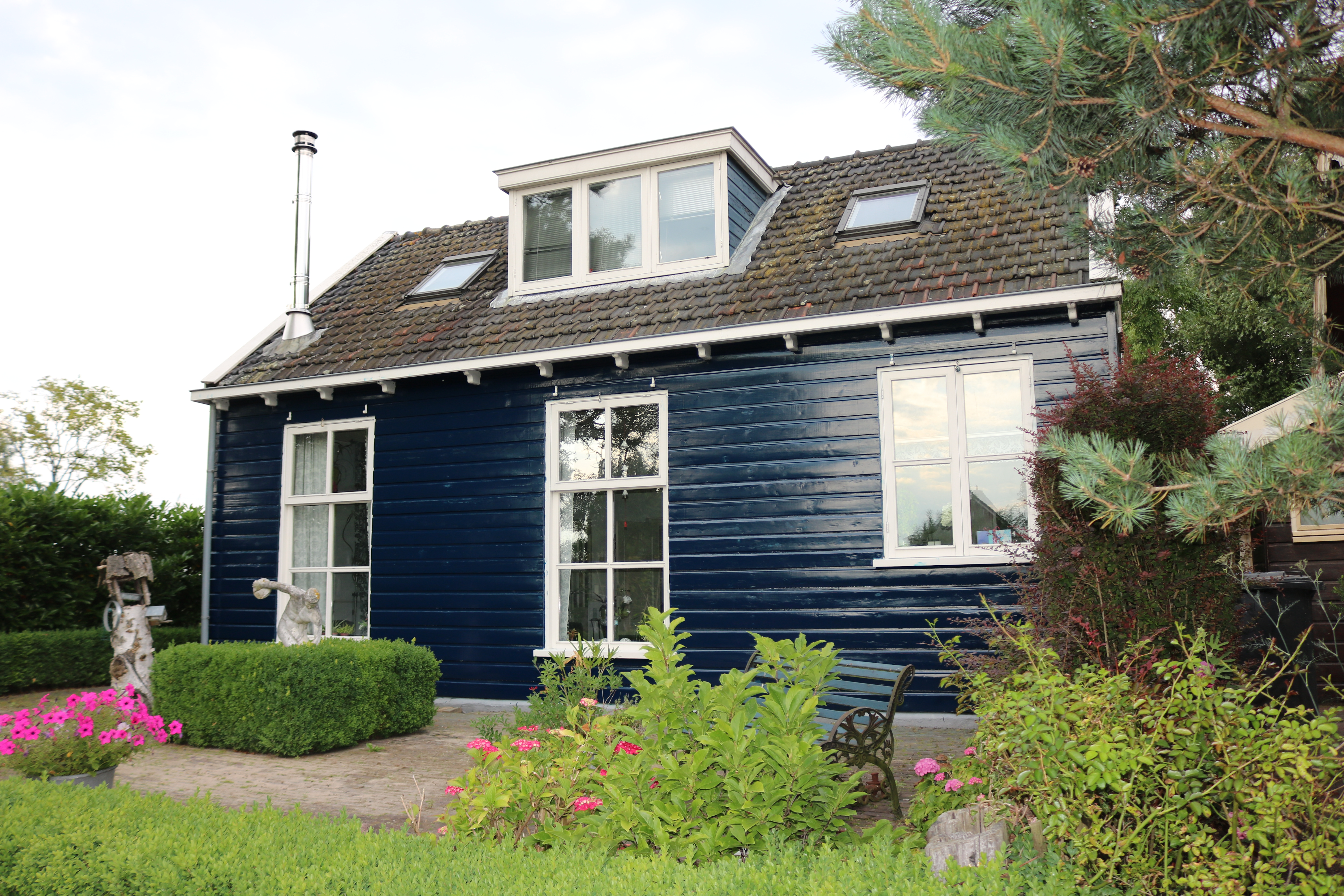 Opzichterswoning bij voormalige stopplaats Keverdijkscheweg bij Weesp (foto: Daniel van der Ree)